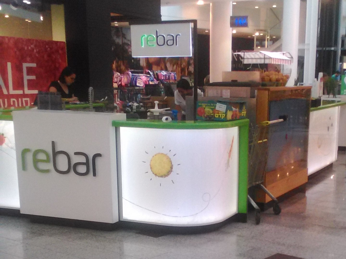 rebar דוכן